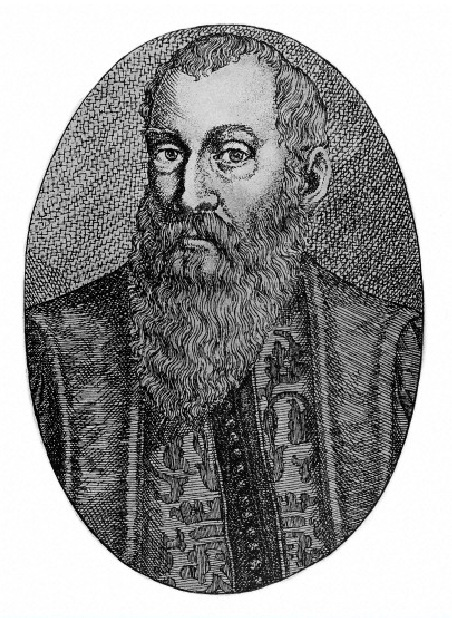 Giovanni Filippo Ingrassia